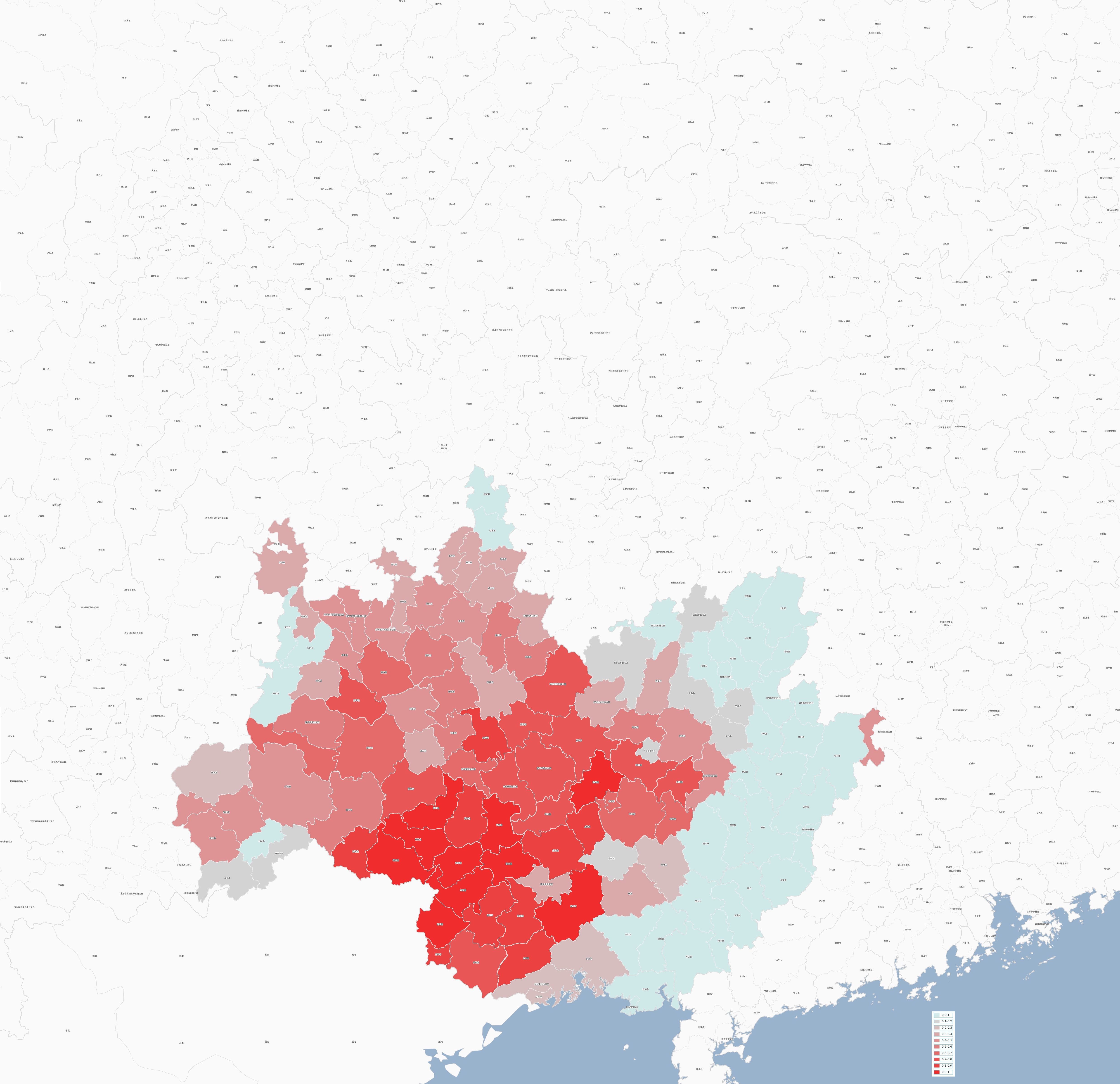 数据来源:沙南曼森整理的《广西各县市壮族人口排序》《贵州各县市布依族人口》，云南及广东部分为作者查找。(注意:由于原数据文件未添加具体数据来源,真实性有待读者进一步考证)